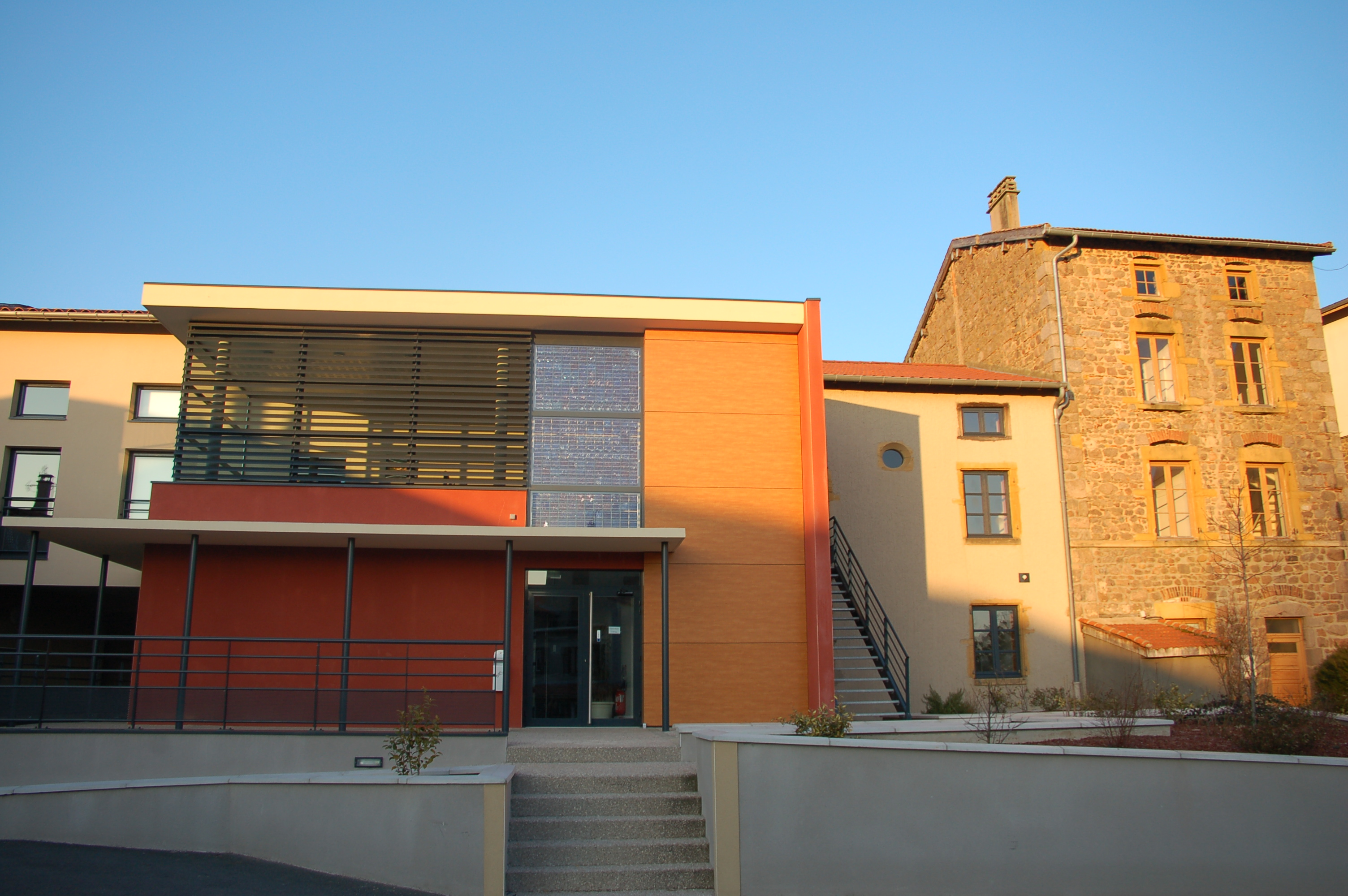 La nouvelle mairie (2007) de Montrottier